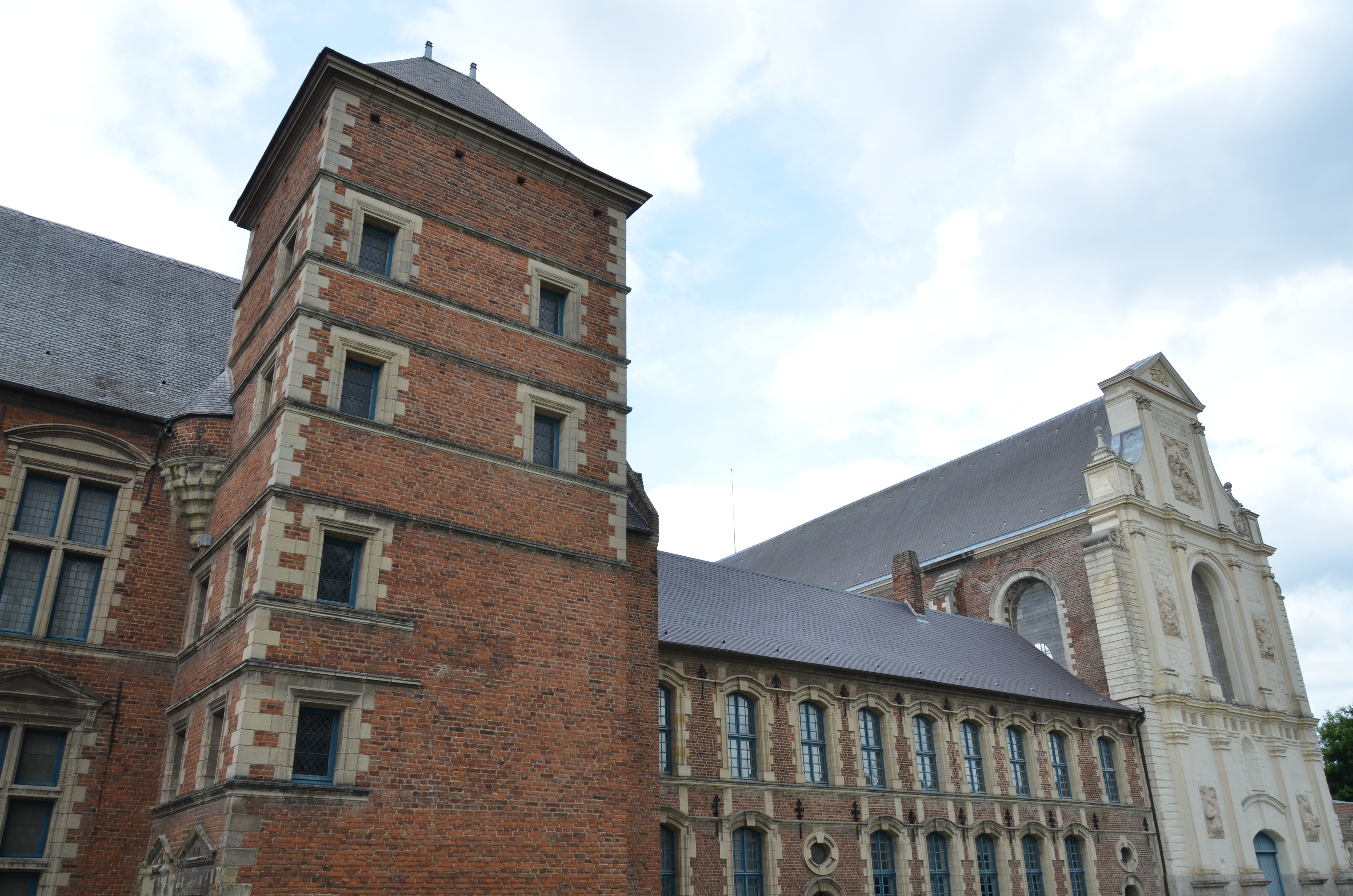 Musée de la Chartreuse de Douai (Nord de la France)